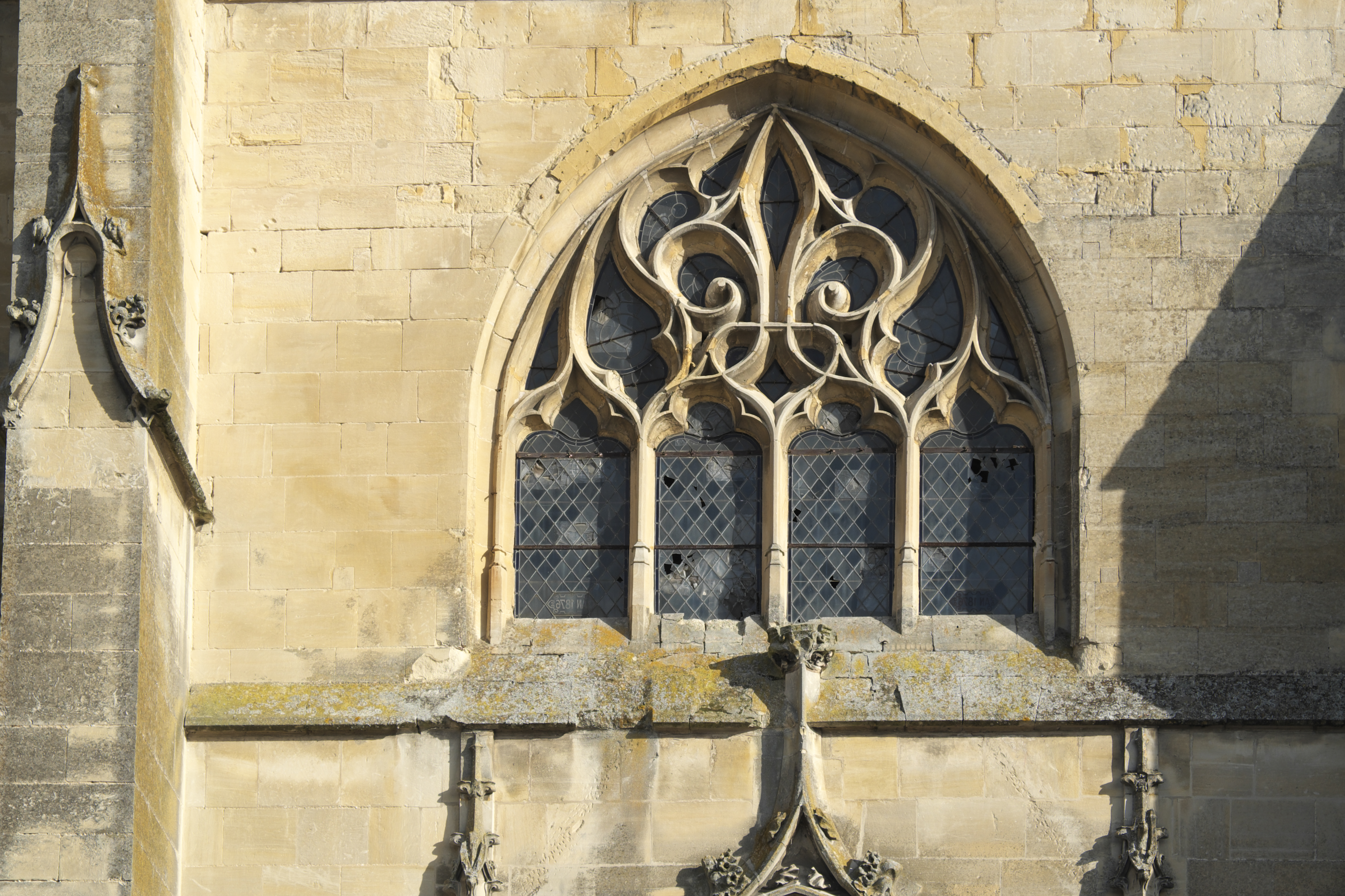 Katholische Pfarrkirche Saint-Gervais-Saint-Protais in Bessancourt im Département Val-d’Oise (Île de France/Frankreich), Westfassade, Maßwerkfenster in Form einer Fleur-de-Lys